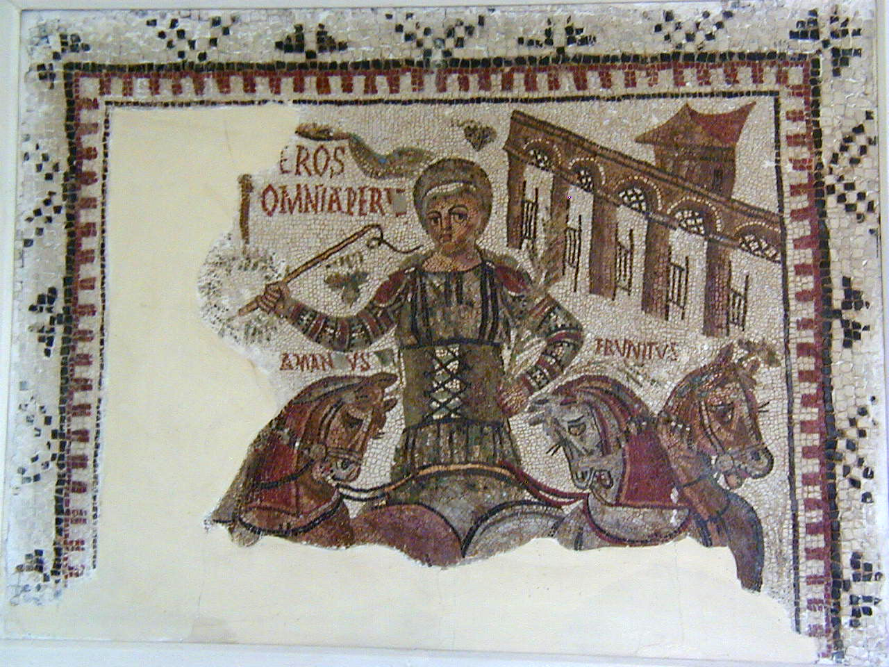 "Mosaique de l'aurige vainqueur", IVe siècle, provenant de Dougga, au Musée national du Bardo (Tunis).